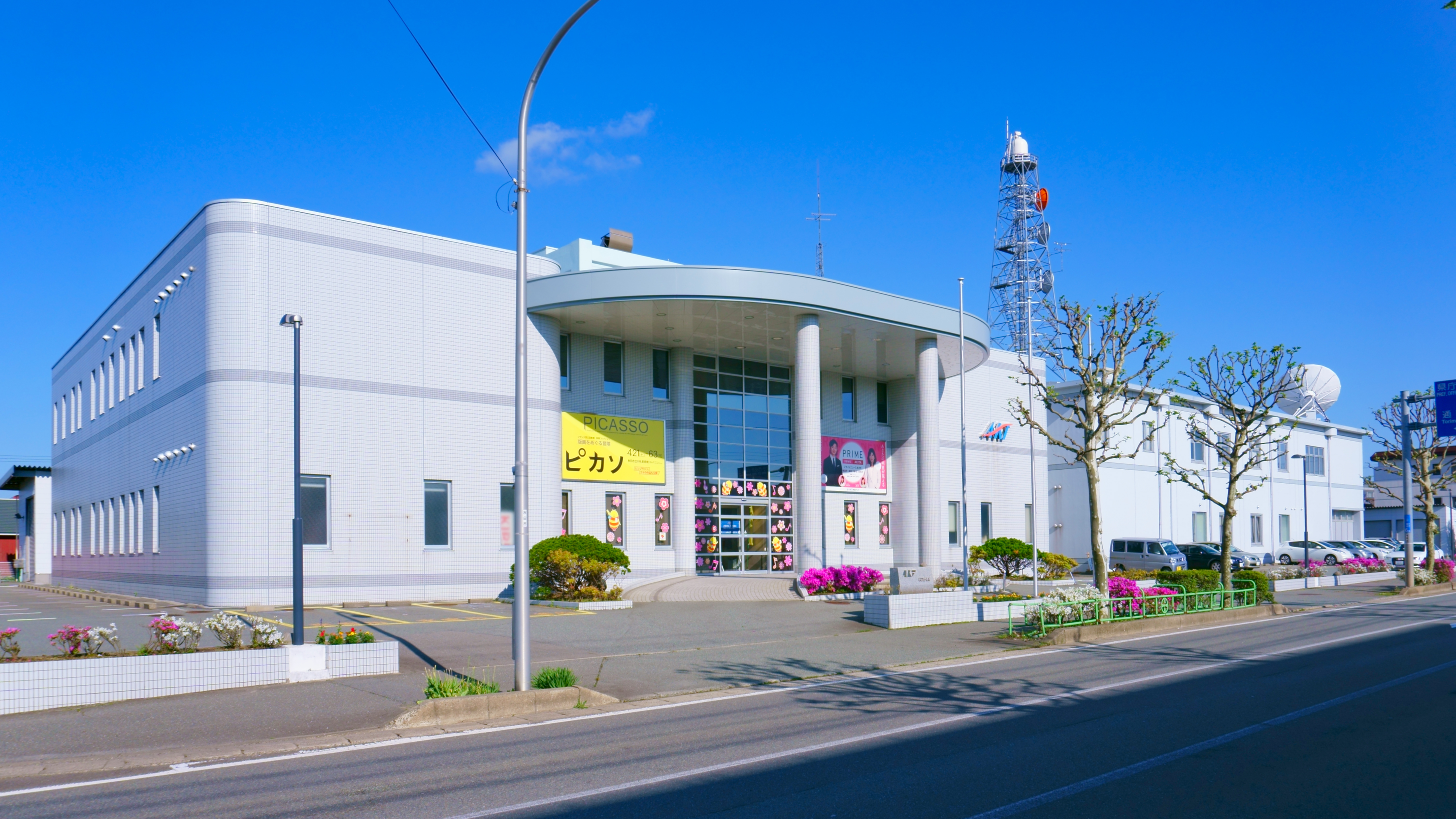 秋田テレビ（AKT）本社 （秋田市八橋本町）